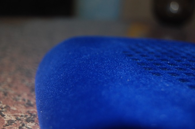 флокирование элемента салона автомобиля